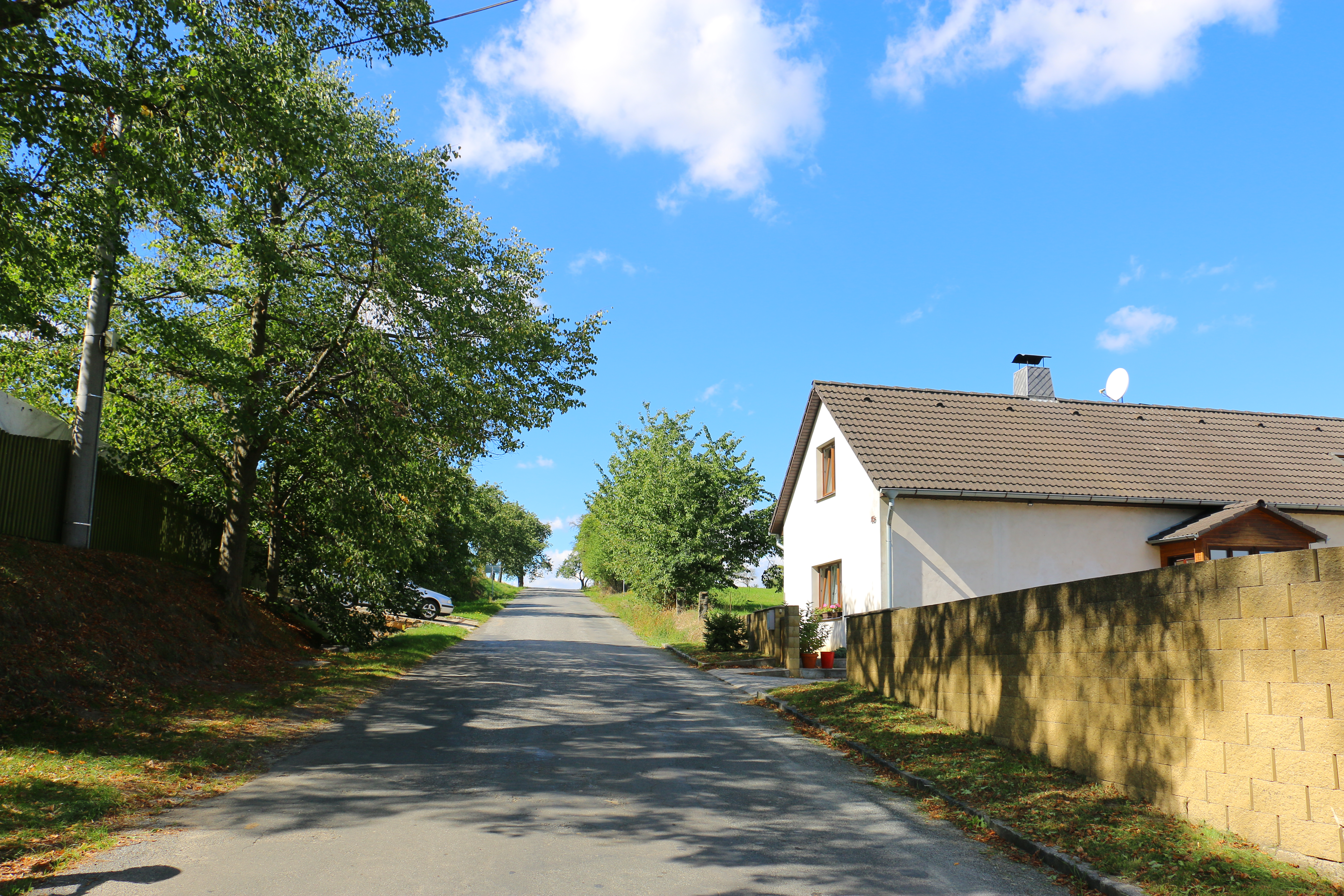 Mrvice, okres Příbram Project: Fotíme Česko